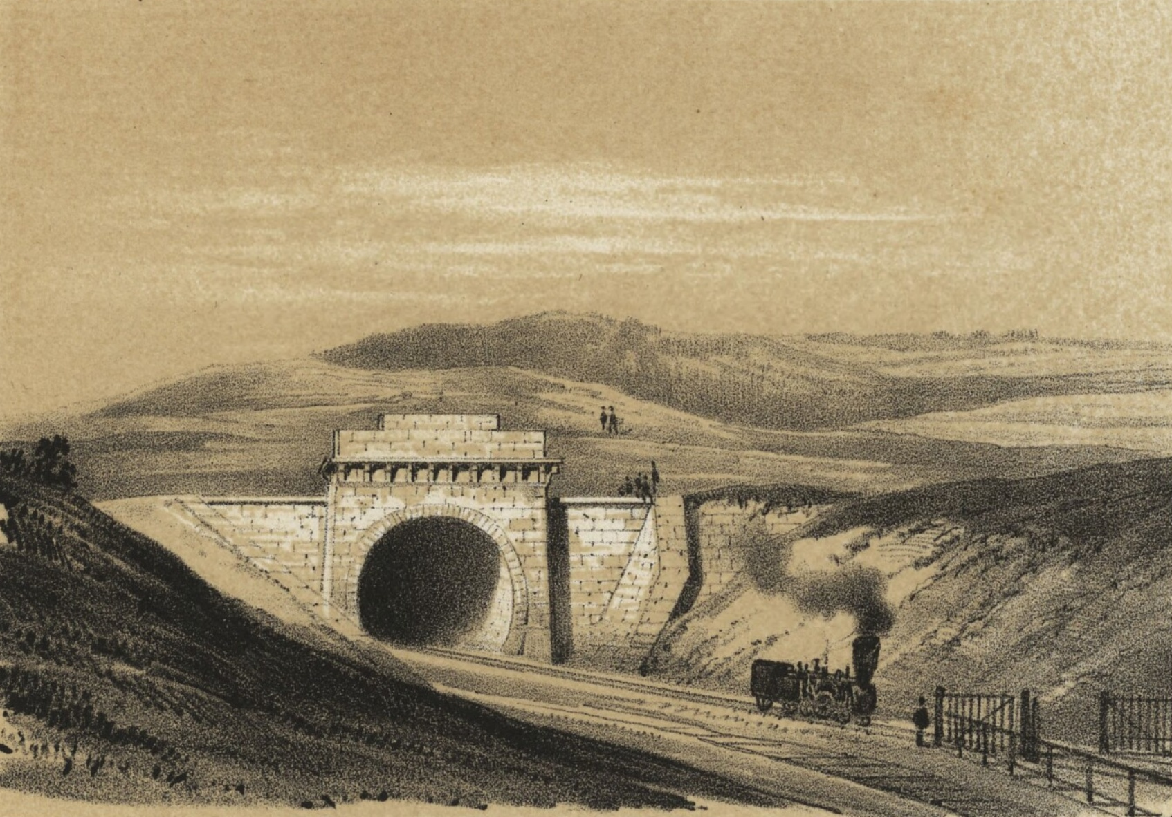 Třebovický tunel v roce 1845